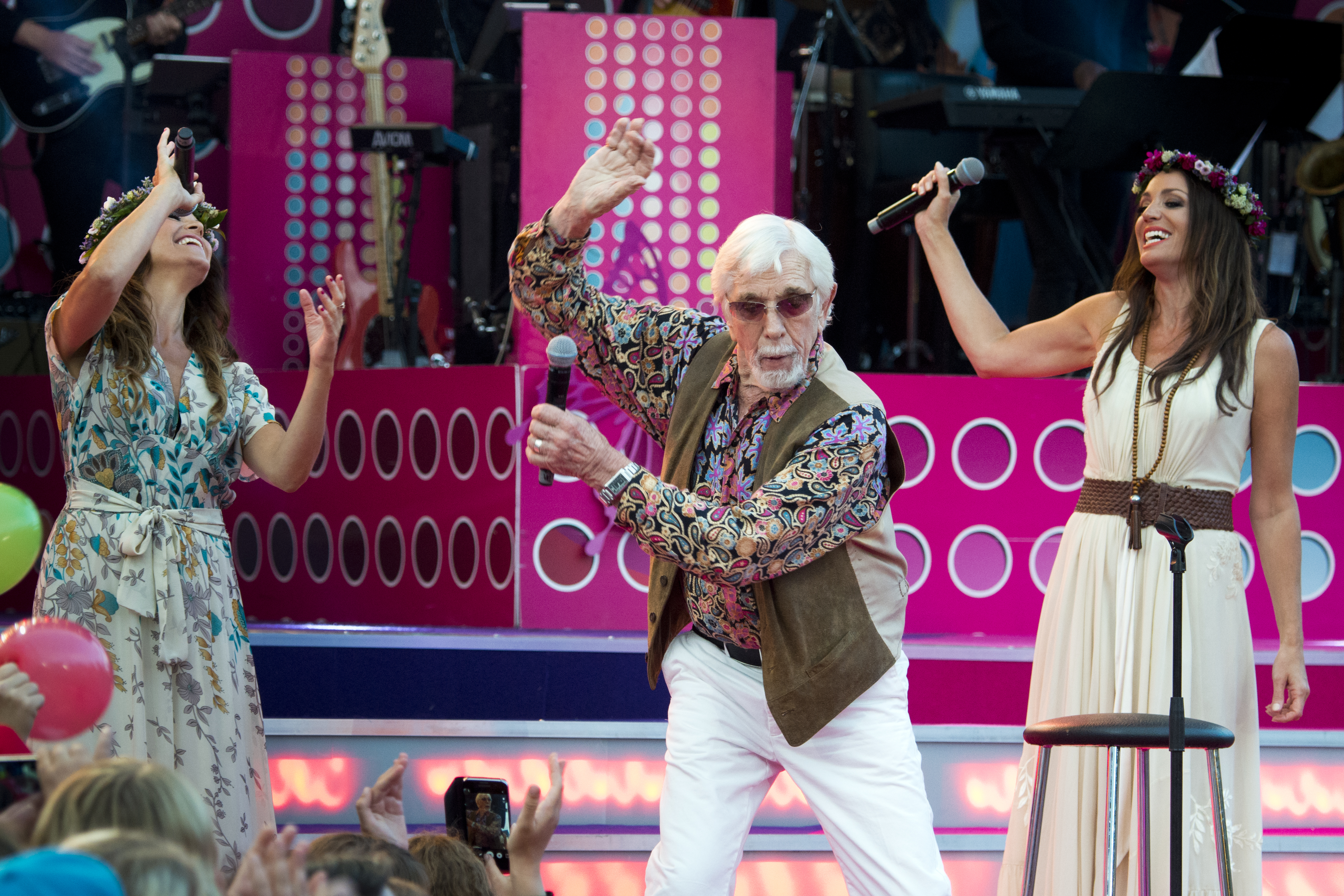 Owe Thörnqvist På Sommarkrysset, Gröna Lund, Stockholm